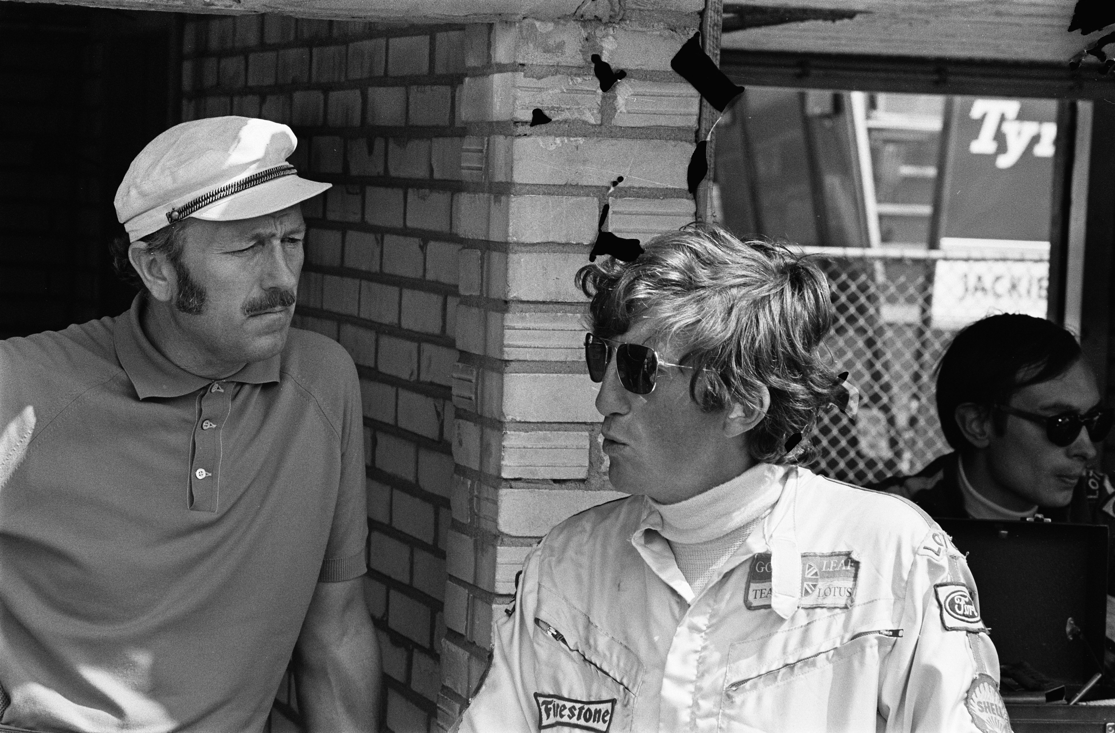 Grand Prix 1970 voor Formule I wagens te Zandvoort; eerste trainingsdag; nr. 11 (links) Colin Chapman , rech Jochem Rindt.